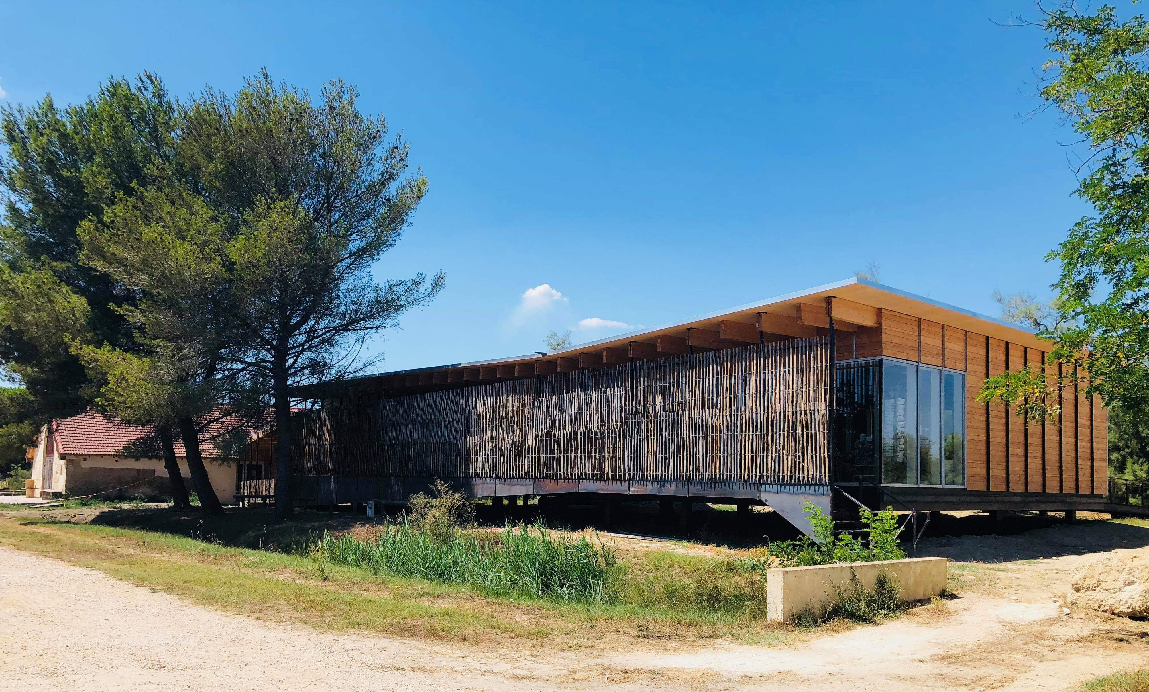 Extension du Musée de la Camargue, nouvelle salle d'expositions et nouvel accueil-boutique